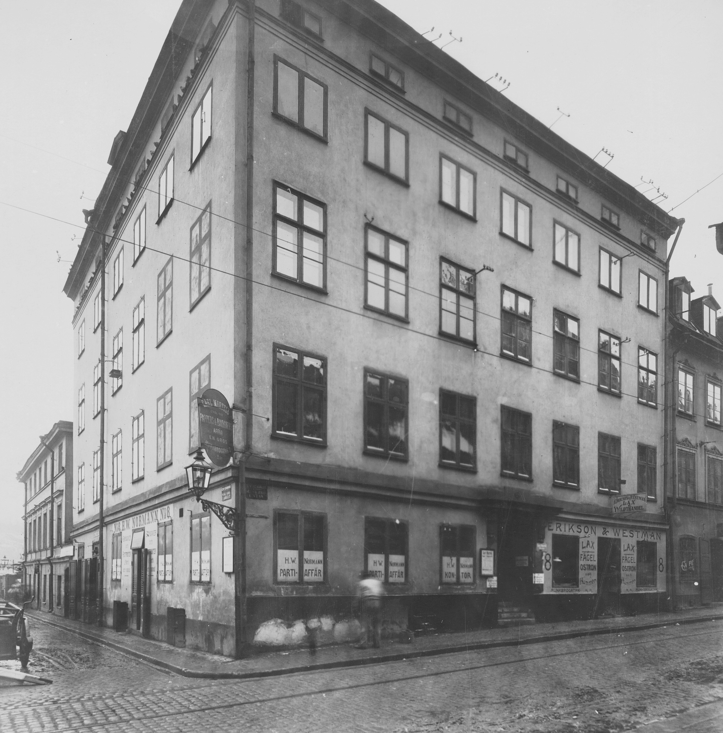 Kvarteret Icarus (hörnet av Munkbrogatan 8 och Mälartorget 8)